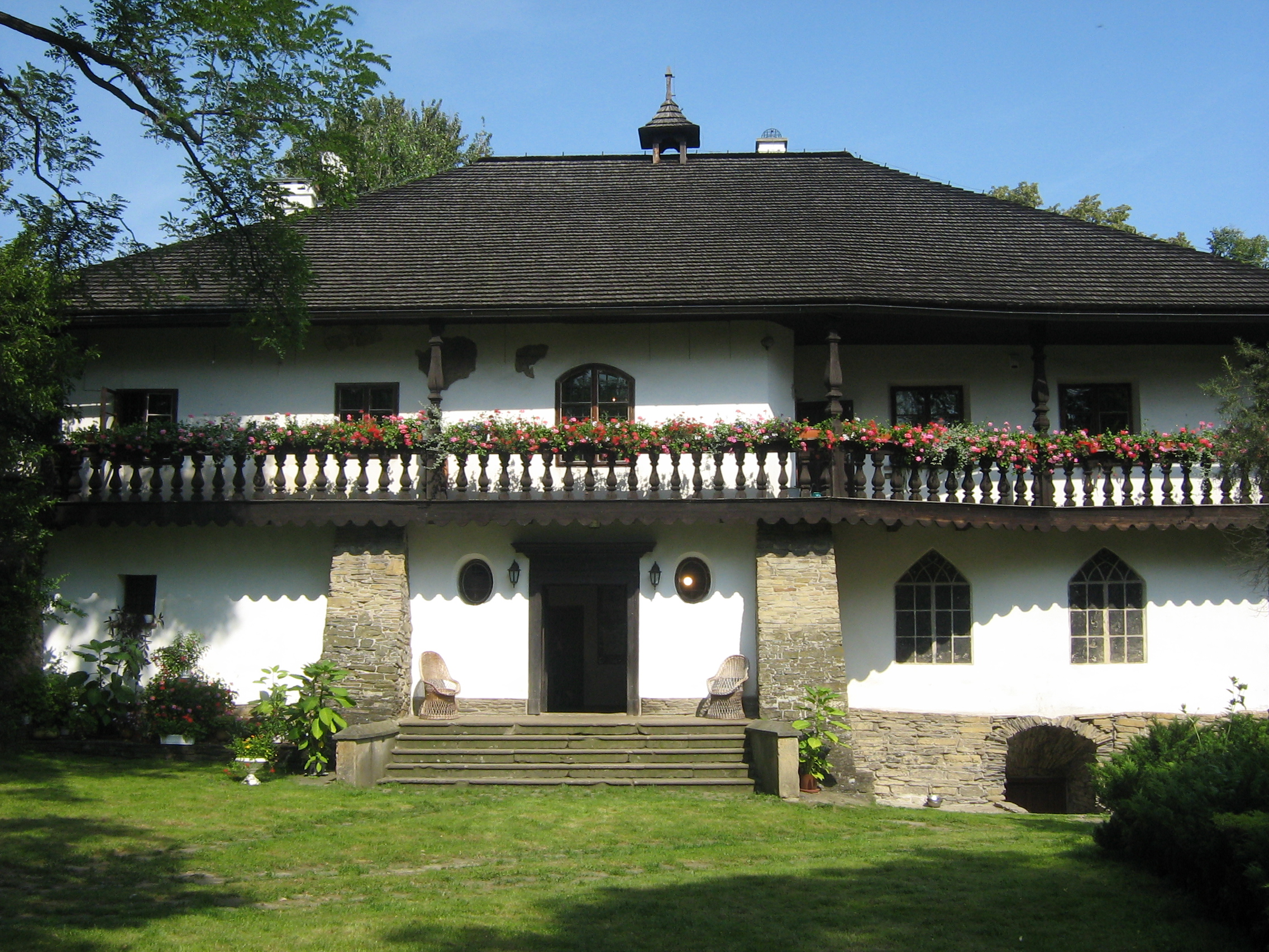 Dwór w Stryszowie